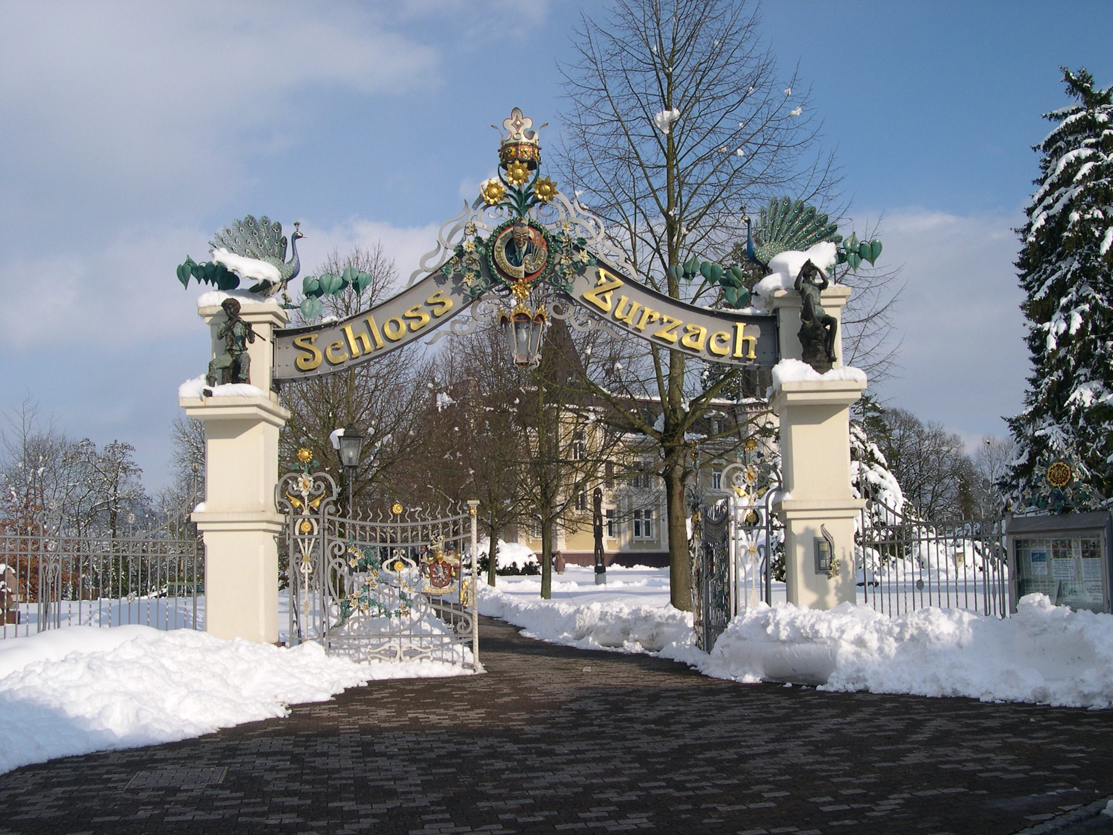 Schloss Zurzach, früher "Villa Himmelrych" genannt. Erbaut von Jakob Zuberbühler um 1900.